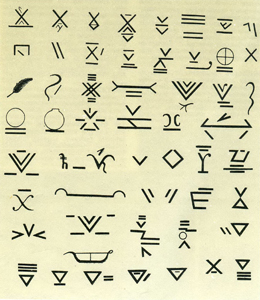 Беларуская (тарашкевіца): Розныя бортныя знакі, што сустракаліся на Беларусі (па ўсіх тыпах крыніц: копныя ўстановы, гістарычныя і іншыя крыніцы)